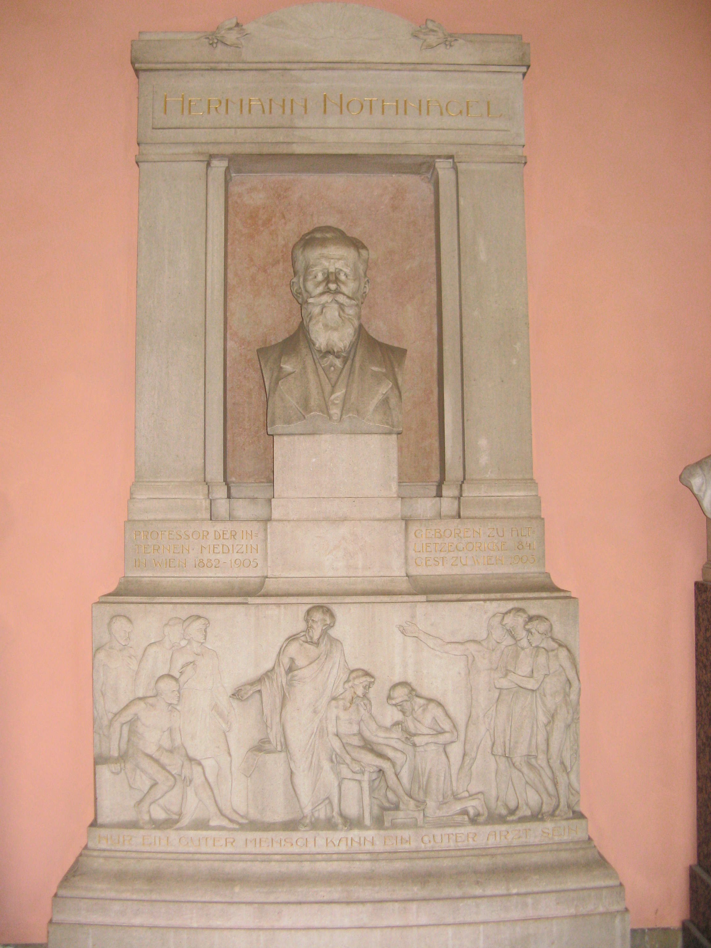 Wien, Universität, Ehrenhalle in den Hofarkaden, Denkmal für Hermann Nothnagel (1841–1905), Internist (Bildhauer: R. Kauffungen, 1910)